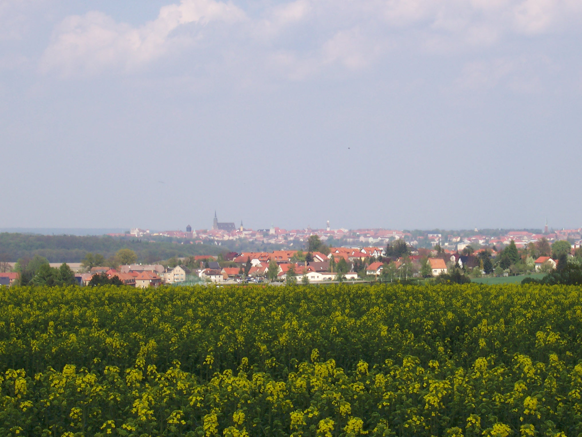 Blick über den Ortsteil Doberschau, im Hintergrund die Stadt Bautzen. Aufgenommen von mir selbst am 01.05.2005